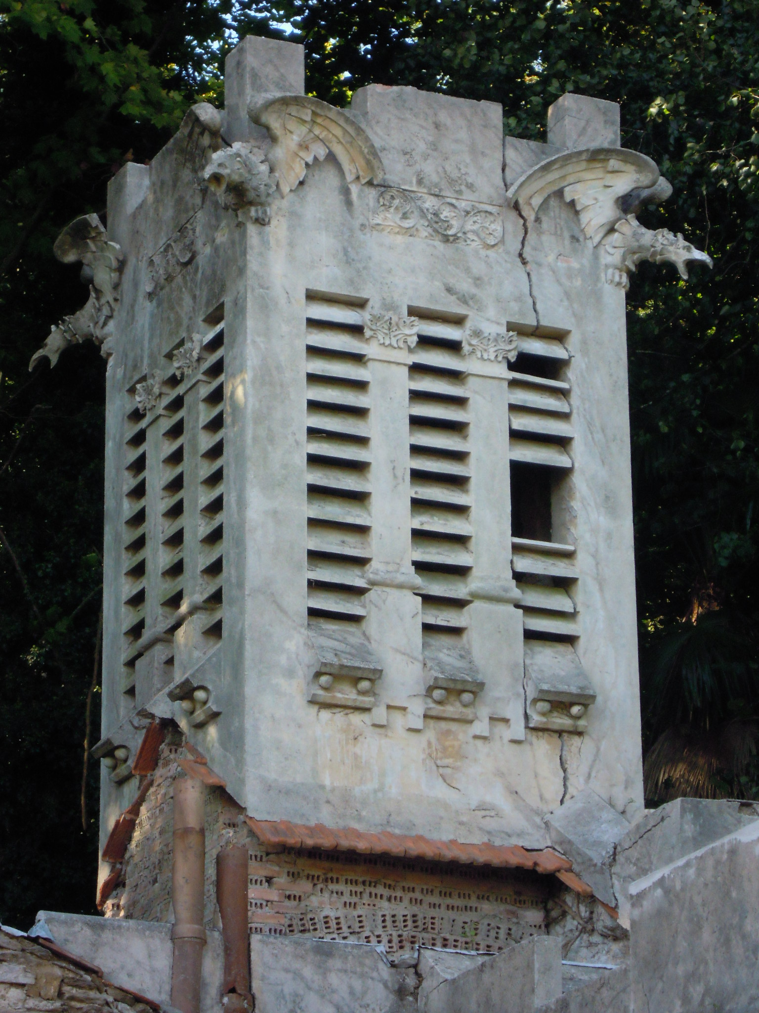 Campanario da capela do pazo do Espiño, en Santiago de Compostela. Categoría:Imaxes de edificios de Santiago de Compostela